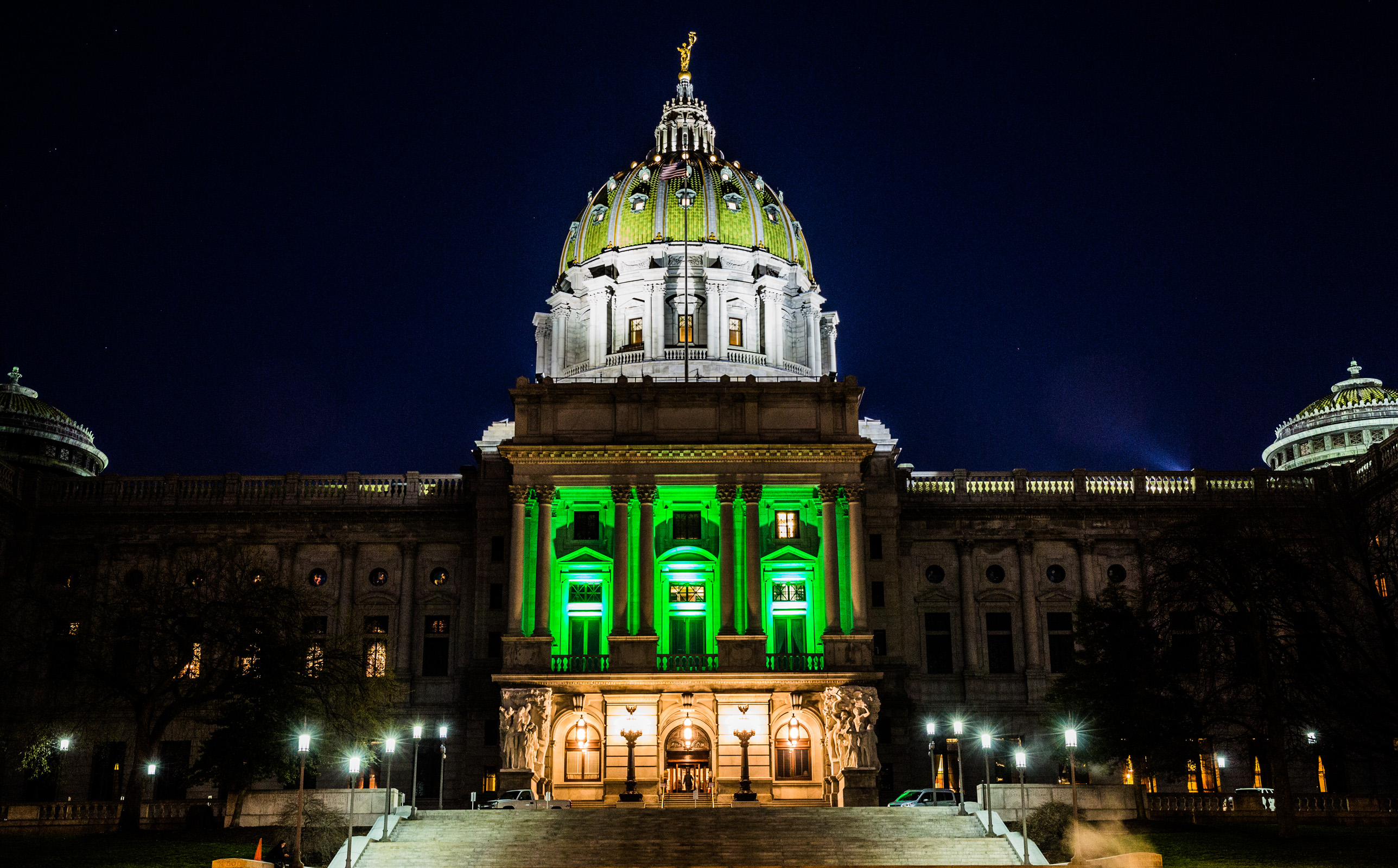 March 16, 2016 Harrisburg, PA